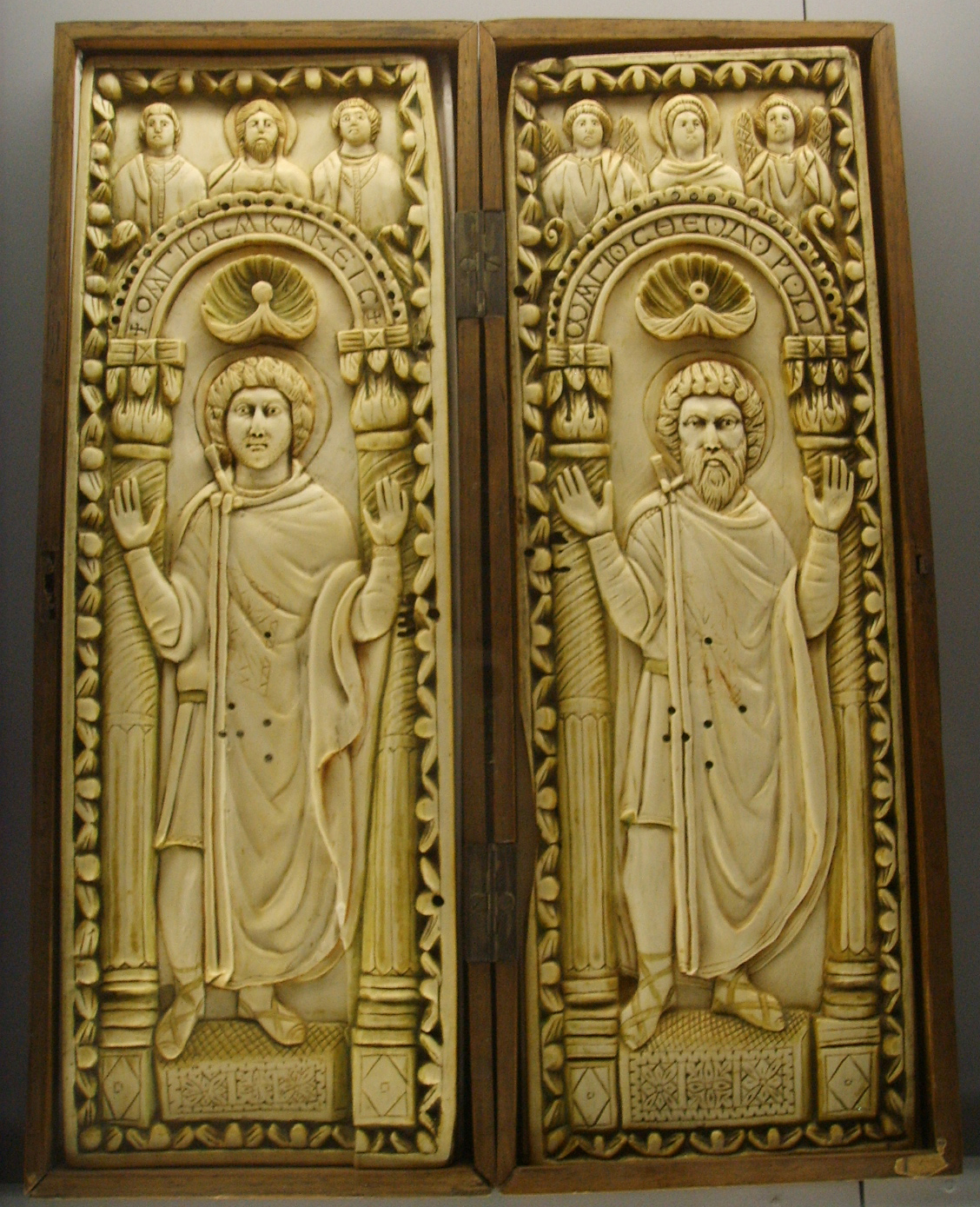 Cremona, museo civico, i santi acacio e teodoro, avorio, fine xi secolo